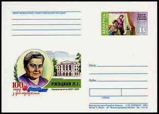 Почтовый конверт Беларуси - Ржецкая Лидия Ивановна